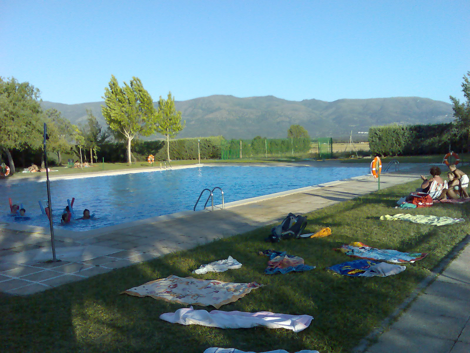 Fotografía de la piscina de Zarza de Granadilla, realizada el 16 de Julio de 2009.